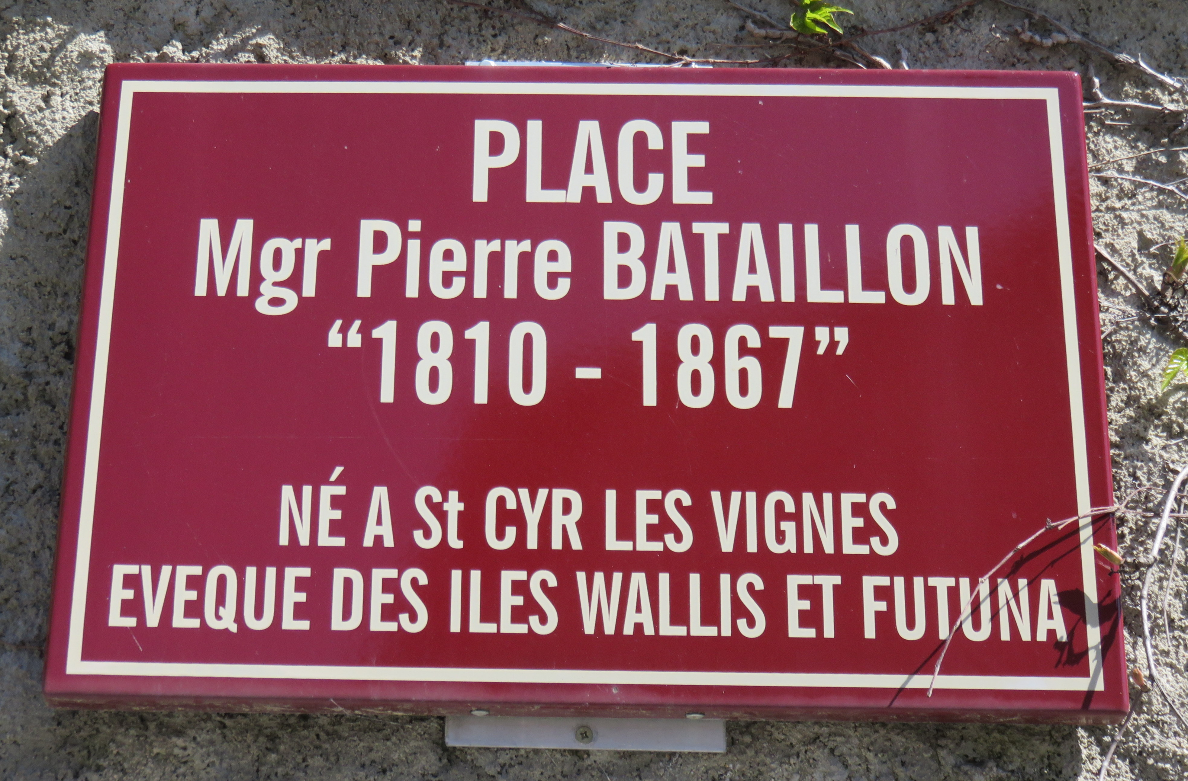 Plaque de la place Mgr Pierre Bataillon, à Saint-Cyr-les-Vignes (Loire, France).